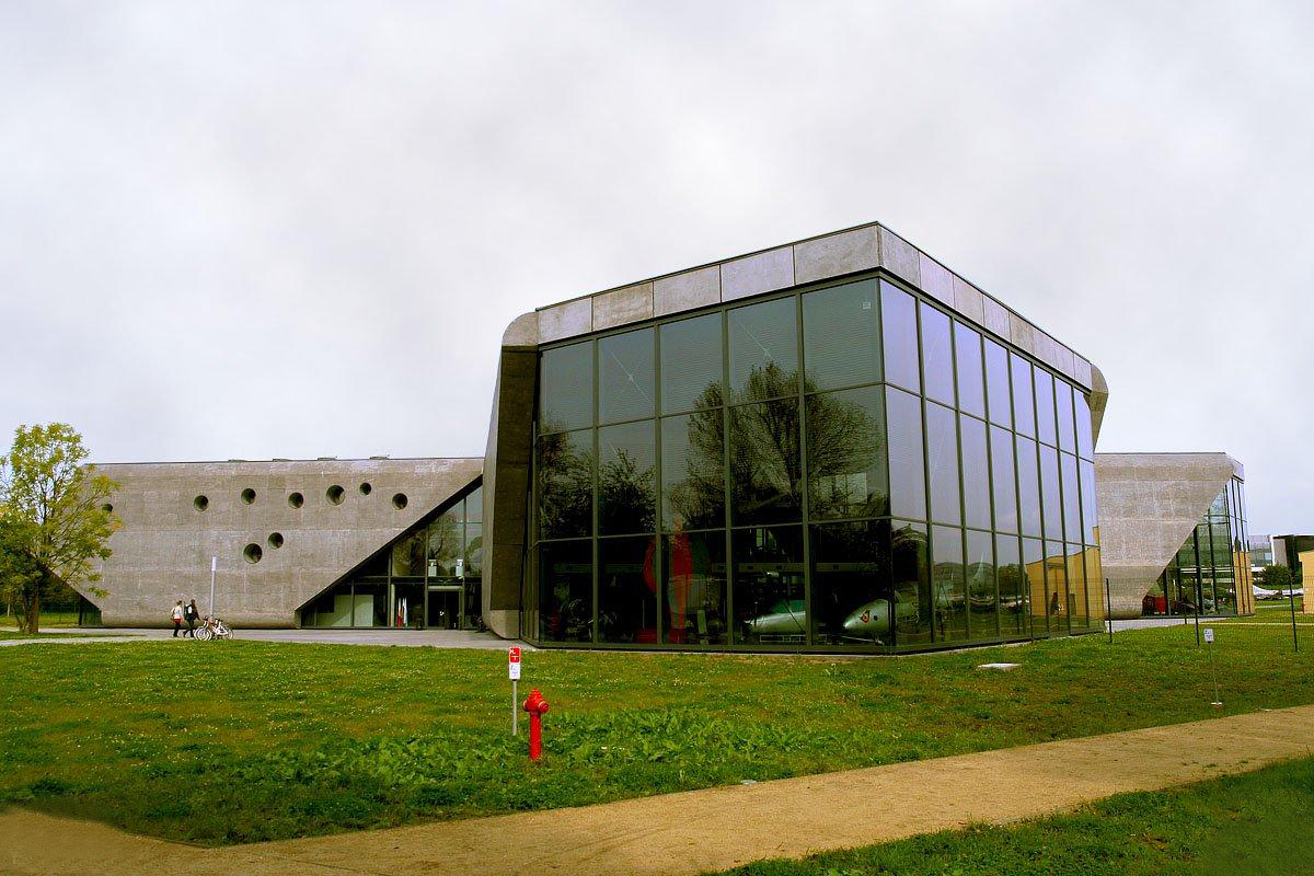 Główny budynek Muzeum oddany do użytku dzień przed zrobieniem zdjęcia